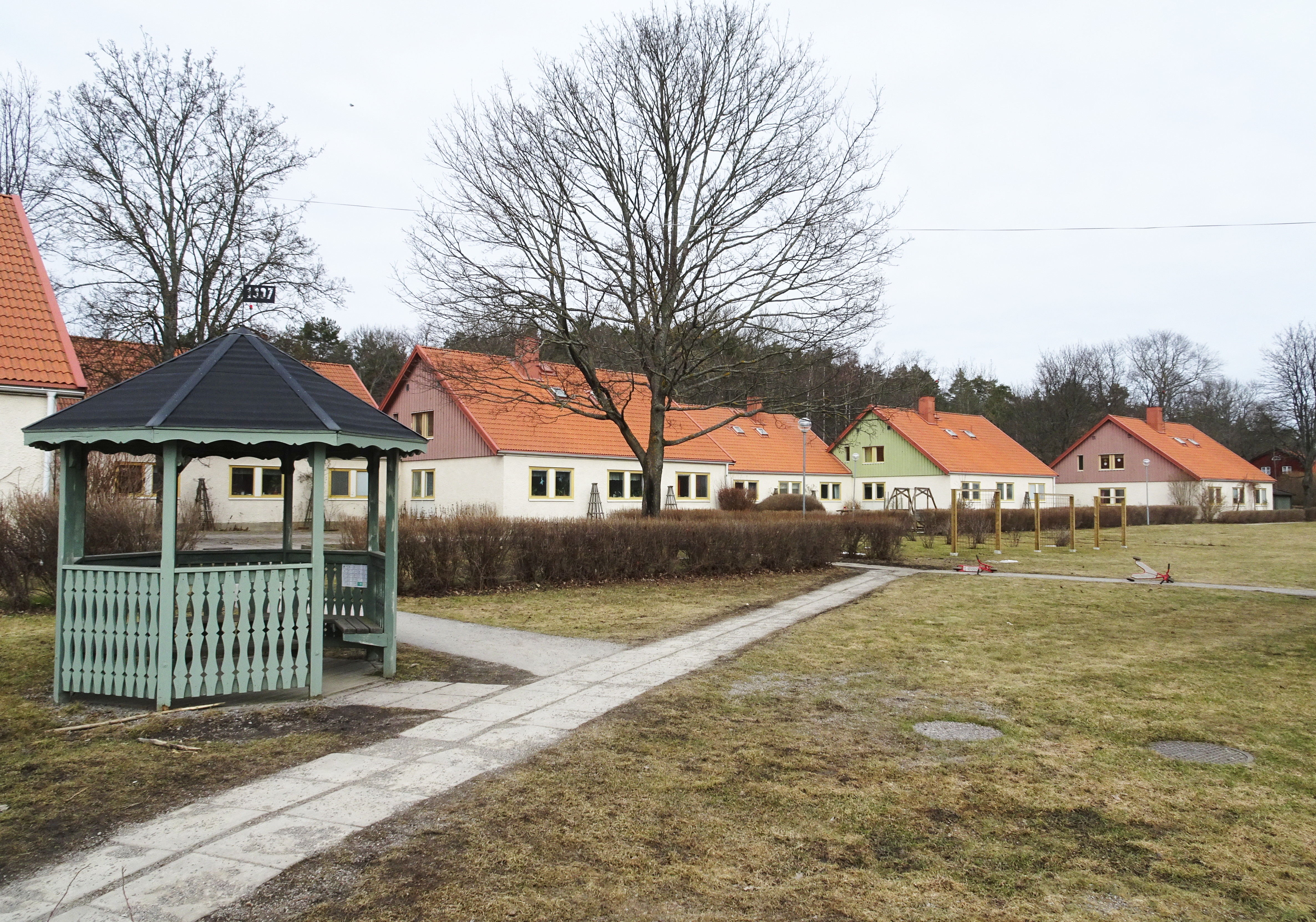 Småhus från 1960-talet som uppfördes som bostäder för elever och personal vid Årsta särskola. Arkitekt Carl-Ivar Ringmar, byggherre Stockholms stads fastighetskontor, byggavdelning.